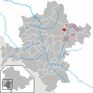 Altersbach in Thuringia - District Schmalkalden-Meiningen